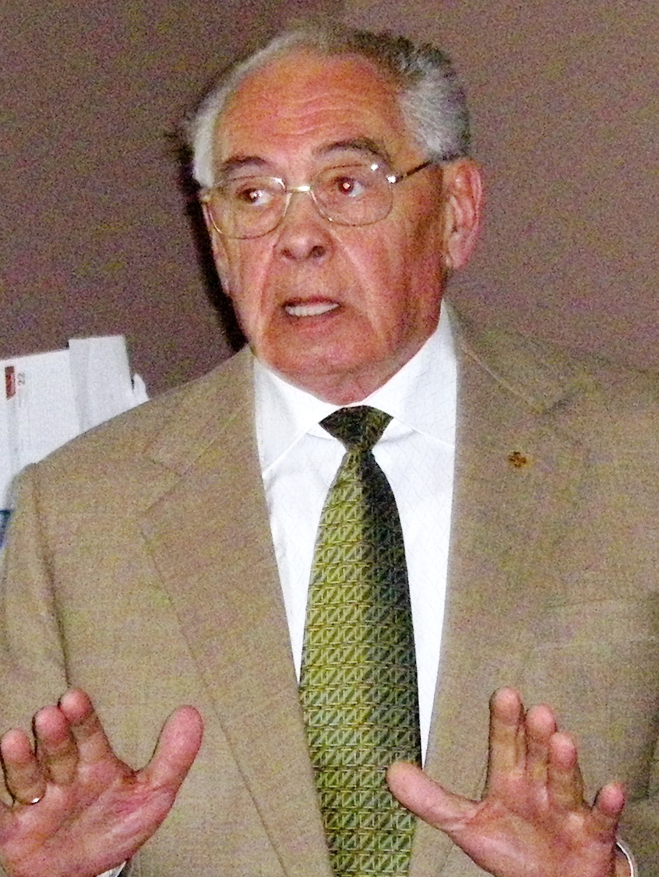 Rein Järlik